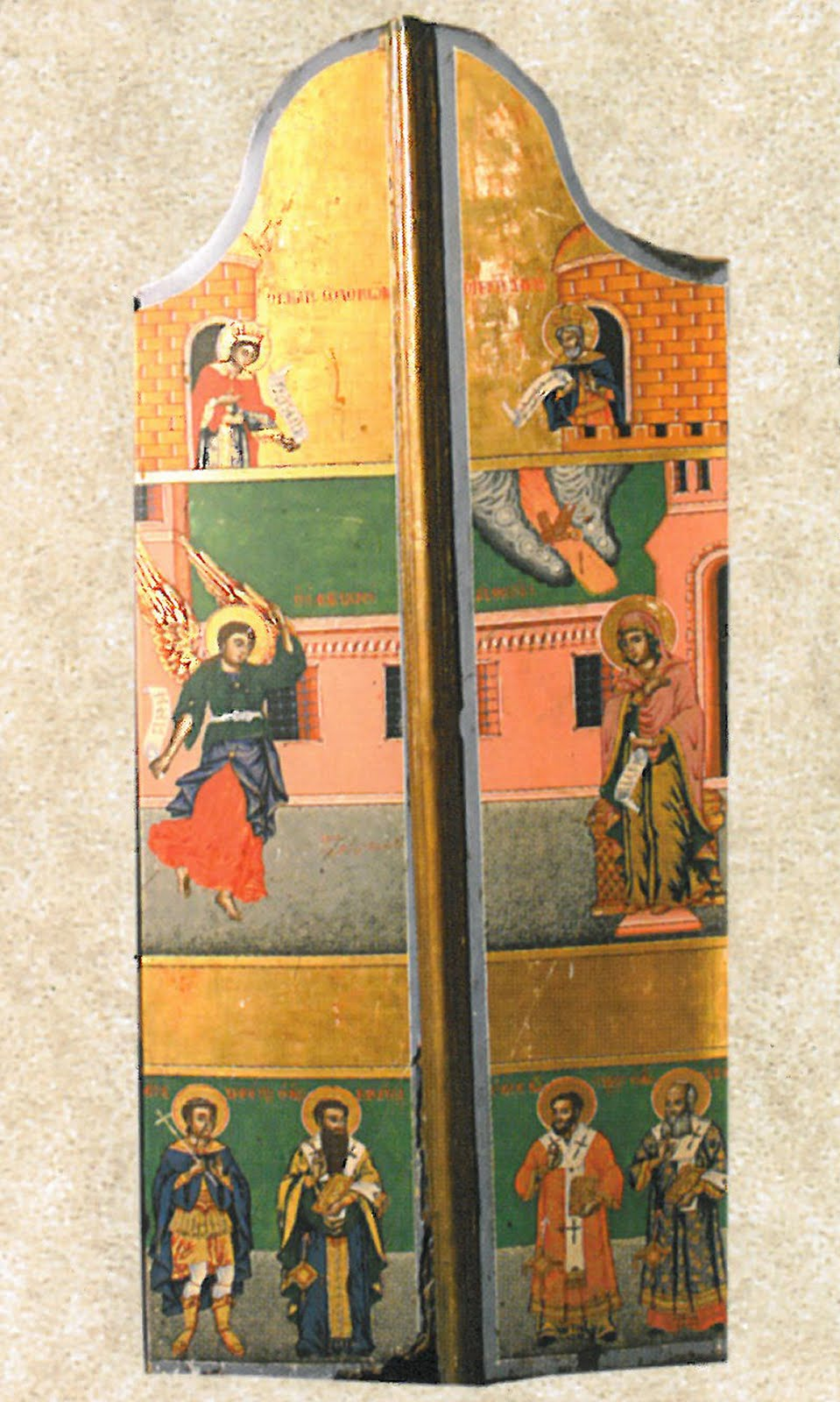 Царските двери на църквата "Успение Богородично" в Епаноми.